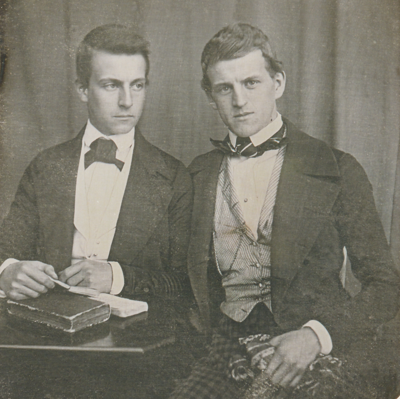 Links: Heinrich Behrens (* 28. September 1828; † 20. Februar 1913 in Lübeck), Lübecker Kaufmann und Numismatiker. Rechts: Jakob Behrens (* 30. Juni 1824 in Lübeck; † 6. März 1897 in San José, Kalifornien), deutsch-amerikanischer Kaufmann und Entomologe